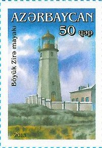 Lighthouses of Azerbaijan. N 1082 - 50 qapik. There are pictured Boyuk Zira lighthouse on the stamp.